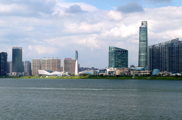 从湘江西岸眺望长沙滨江文化园